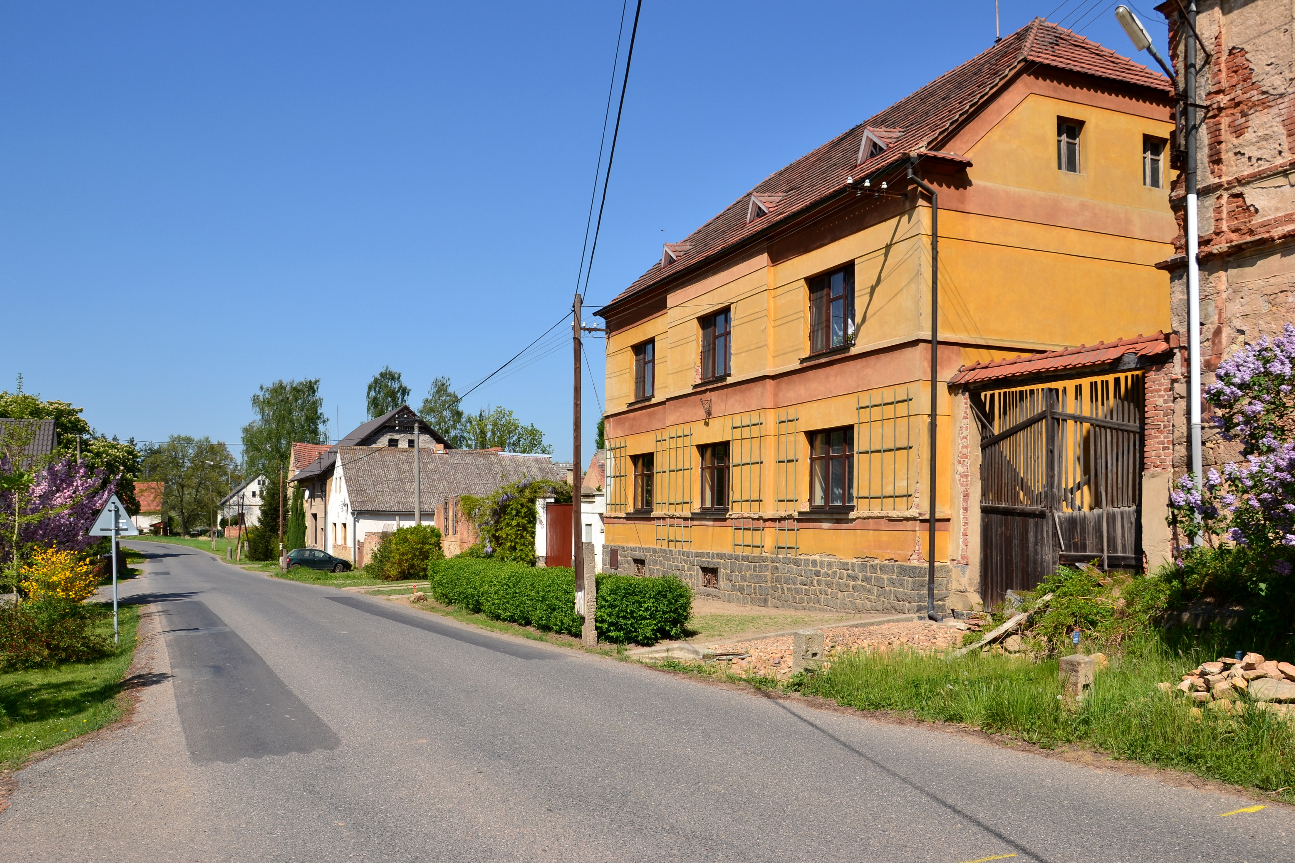 Zderaz – východní část vesnice